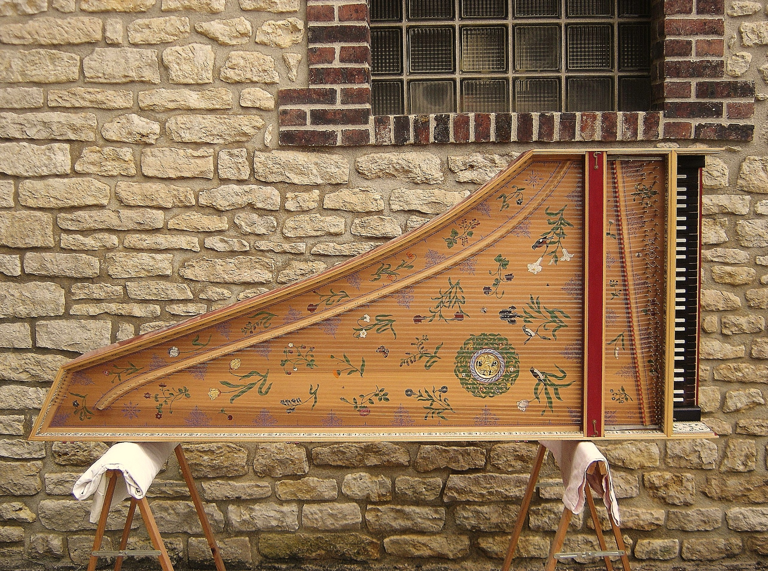 Clavecin de type flamand - 1 clavier - 2x8' - Vue d'ensemble, instrument en position de transport